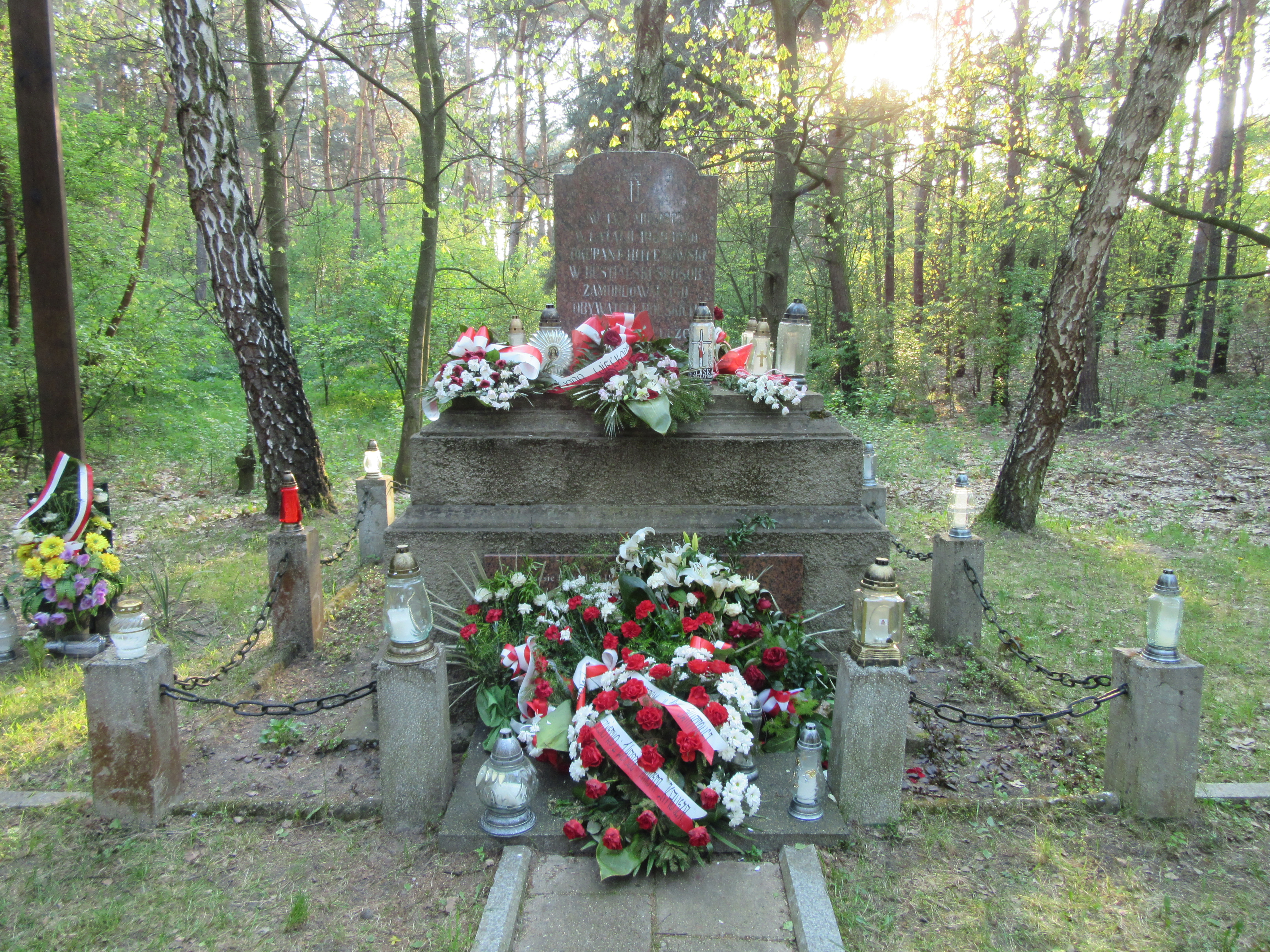 Obelisk upamiętniający Polaków zamordowanych przez hitlerowców w latach 1939-1940 w Lesie Winiarskim